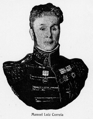 1.º Barão do Valado